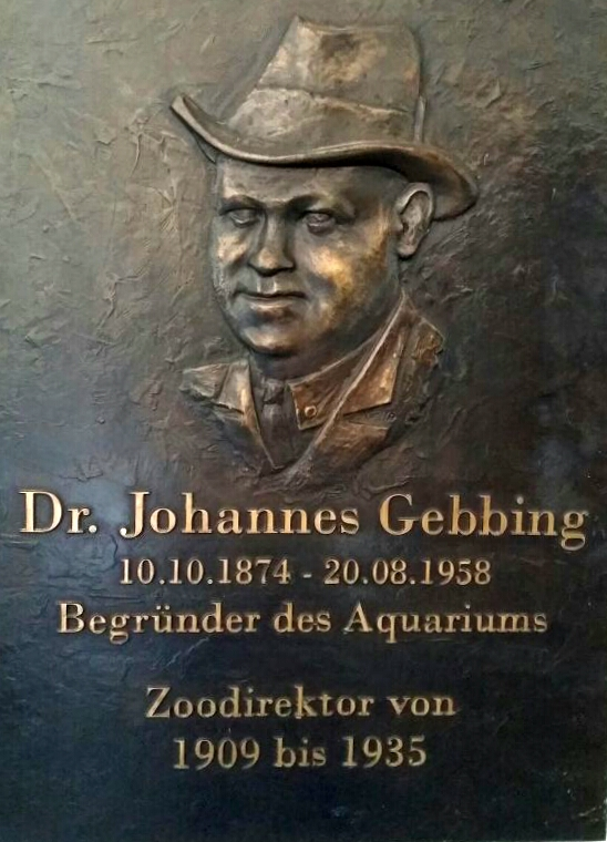 Johannes Gebbing Gründer Zoo Leipzig